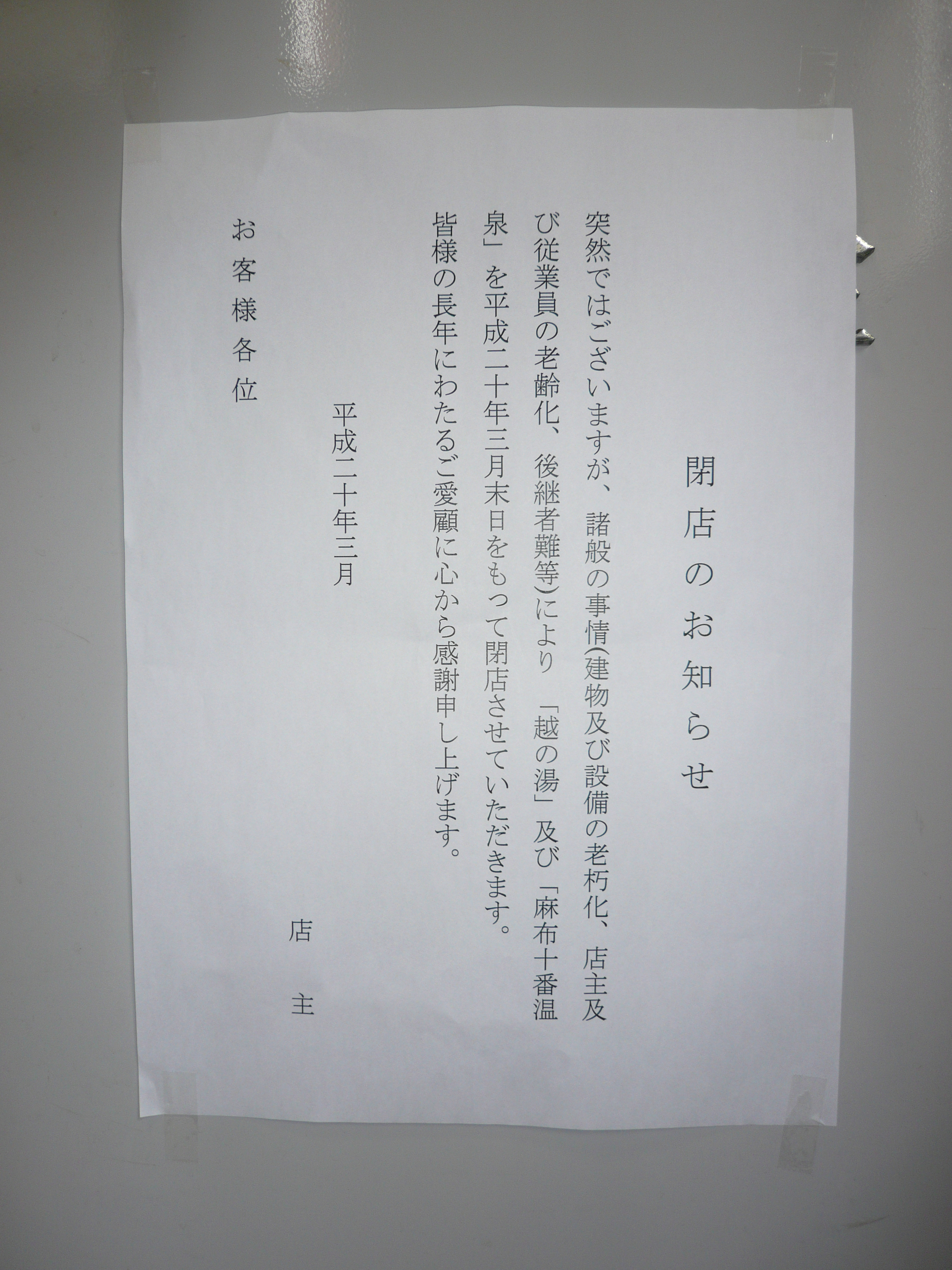 麻布十番温泉の閉店のお知らせ。